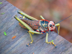 Saltamonte multicolores en Bosque Petrificado; Ubicado entre las provincias de El Oro y Loja.